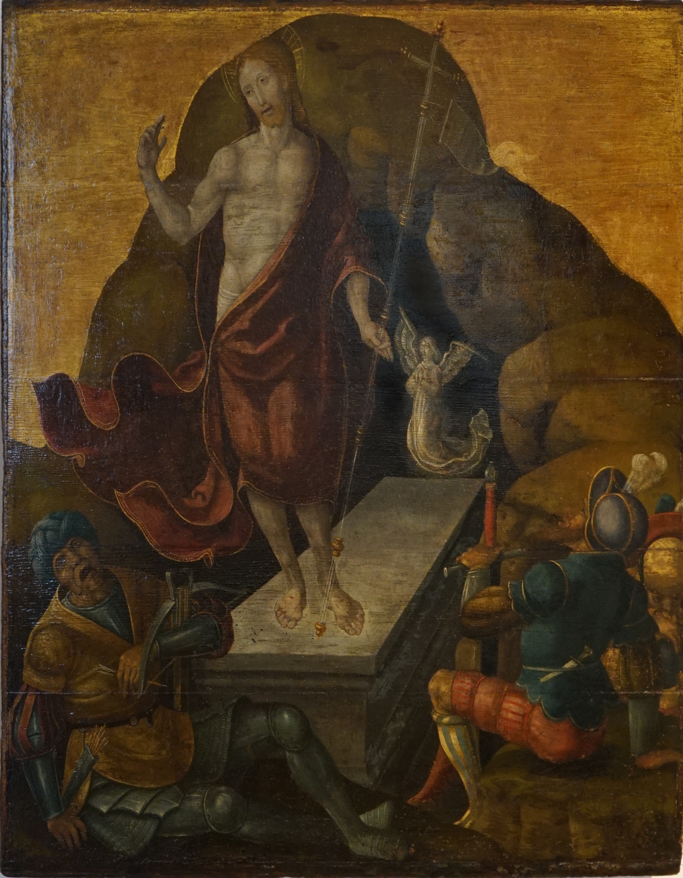 présenté au musée Vauluisant de Troyes.